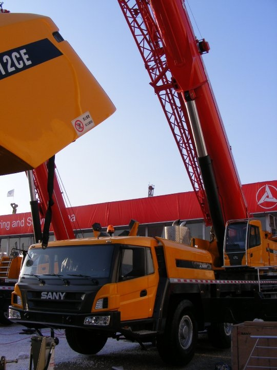 Sany Kran auf der Bauma 2010